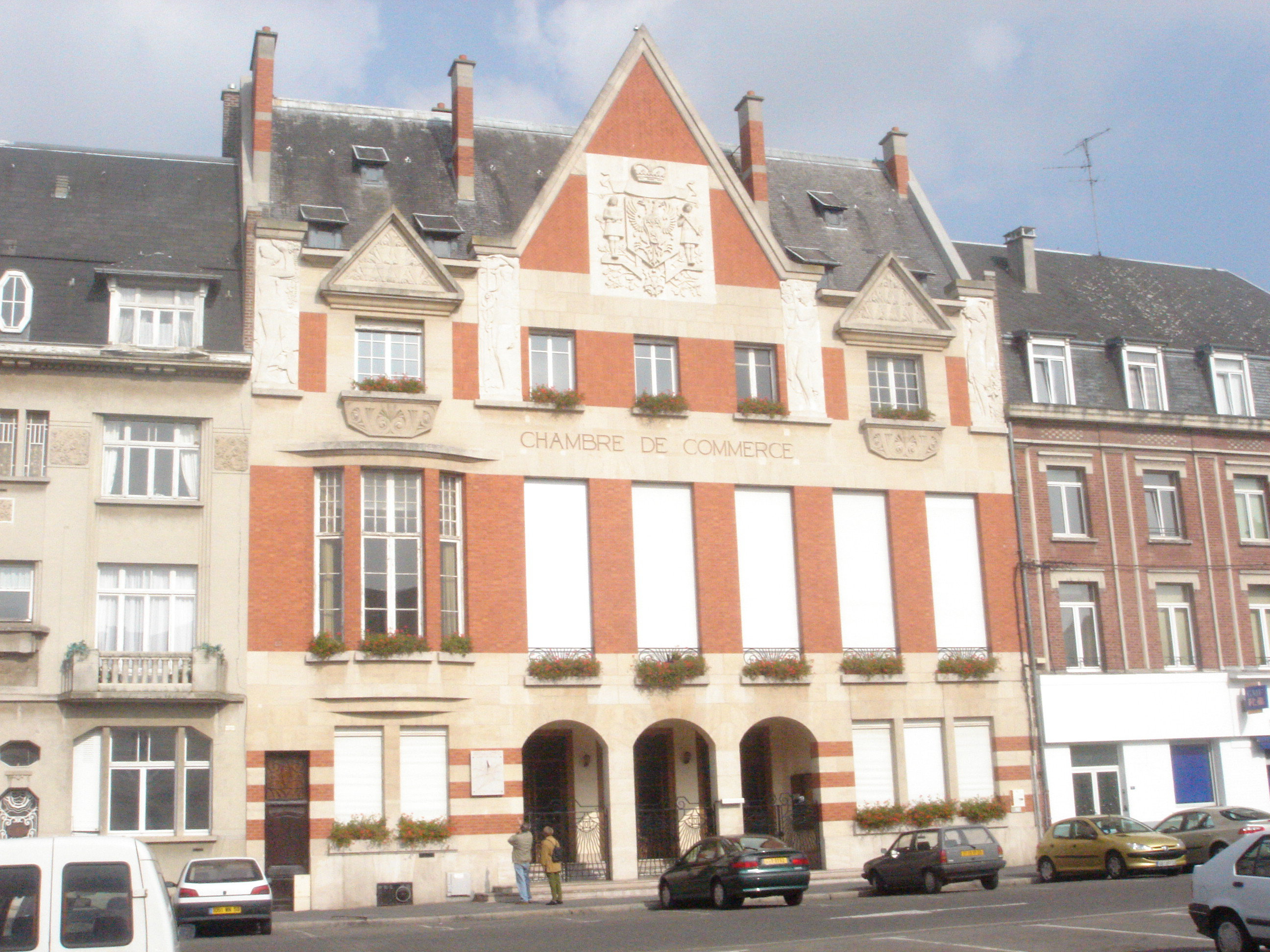 Chambre de Commerce et d'Industrie de Cambrai